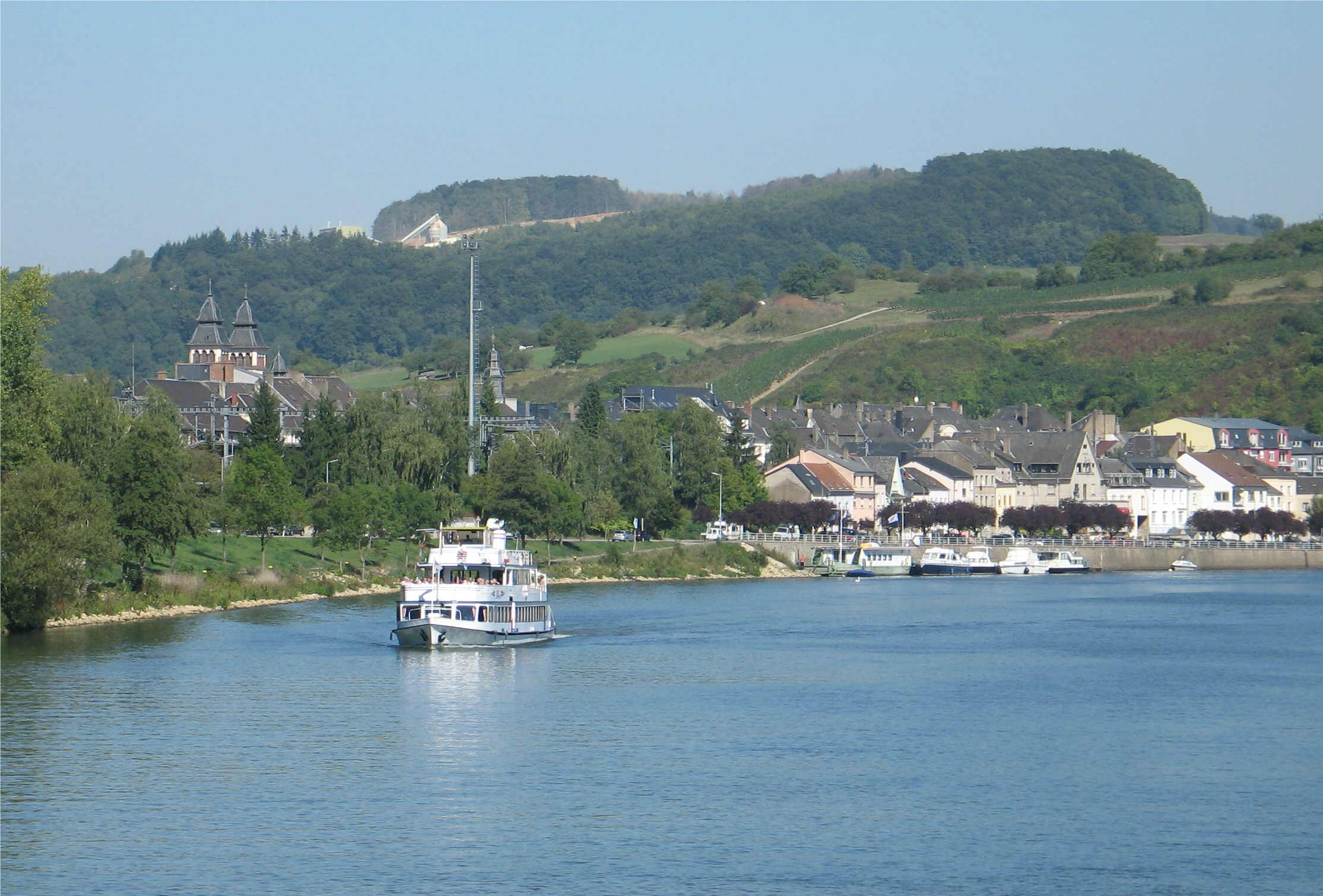 D'Musel bei Waasserbëlleg